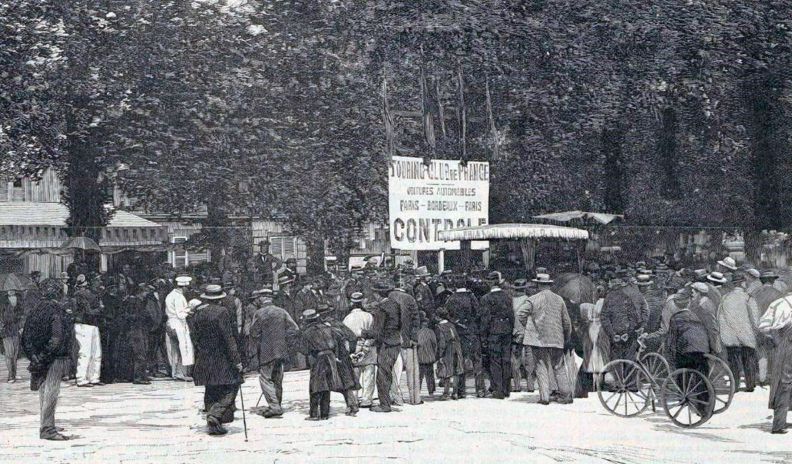 Paris-Bordeaux-Paris 1895, avant le départ de Versailles - Le Monde Illustré du 15 juin 1895, p.389